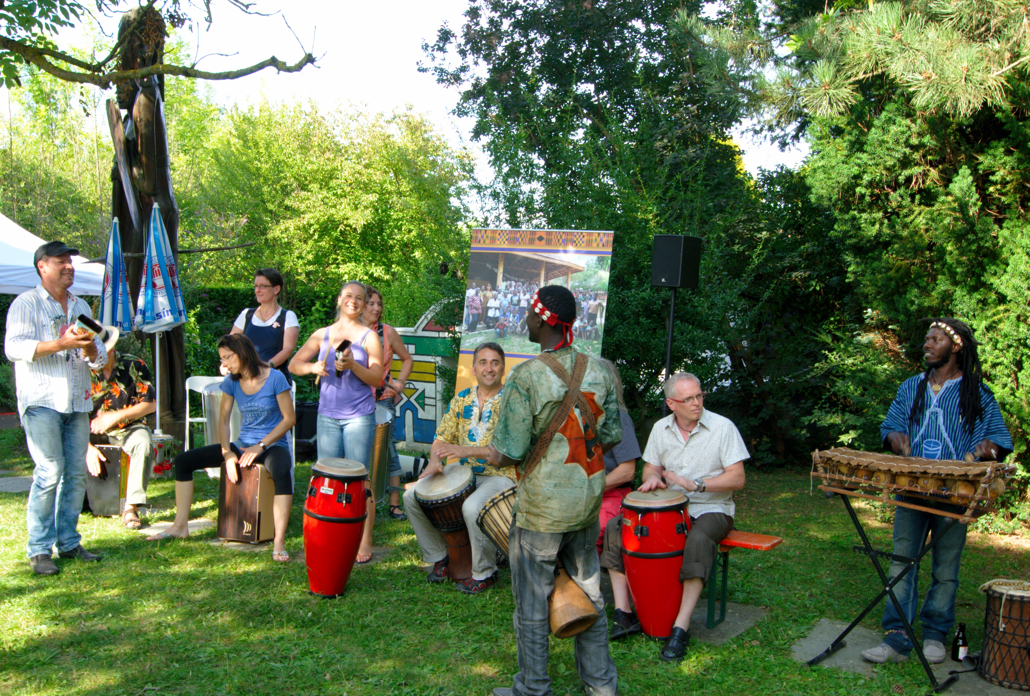 Jam Session: Percussion und Gesang beim Afrikafest 2012 im Afrika-Haus Freiberg. Die deutsche Gruppe Takt-Los gemeinsam mit den Frères Gelia aus Westafrika.